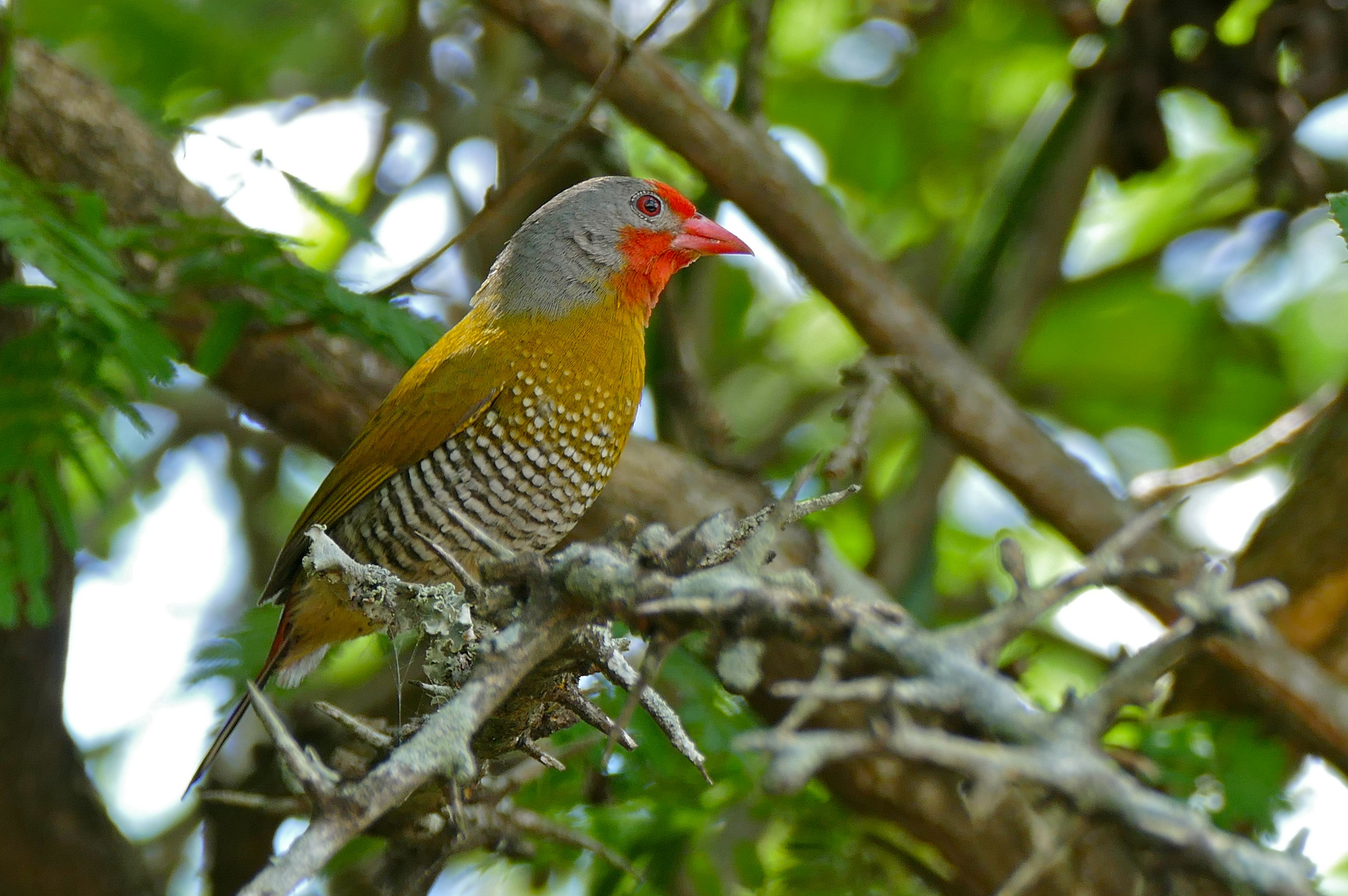 Lower Sabie Camp, Kruger NP, SOUTH AFRICA